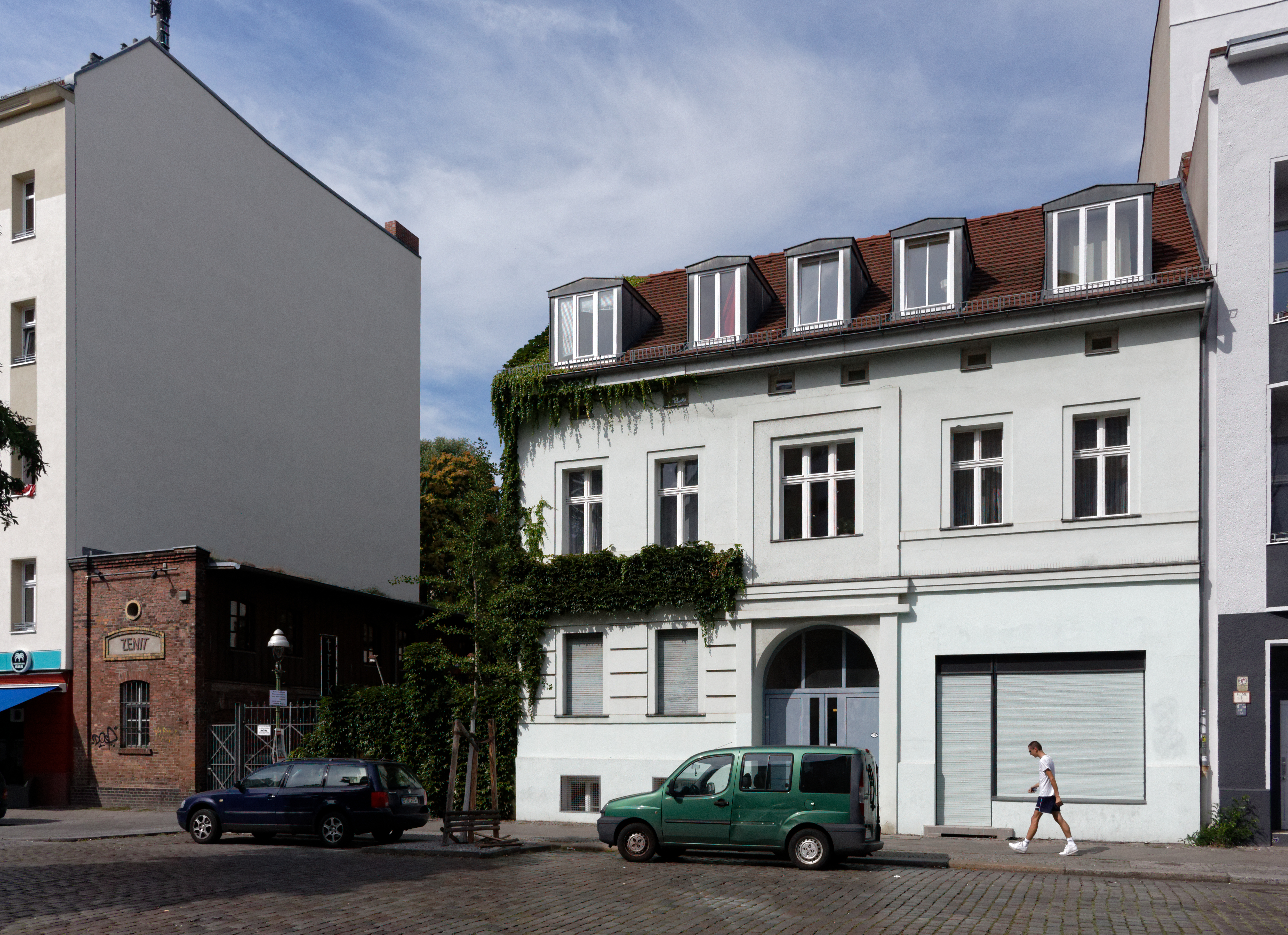 Zinkgießerei Liebenwalder Straße, Ansicht von der Hochstädter Straße